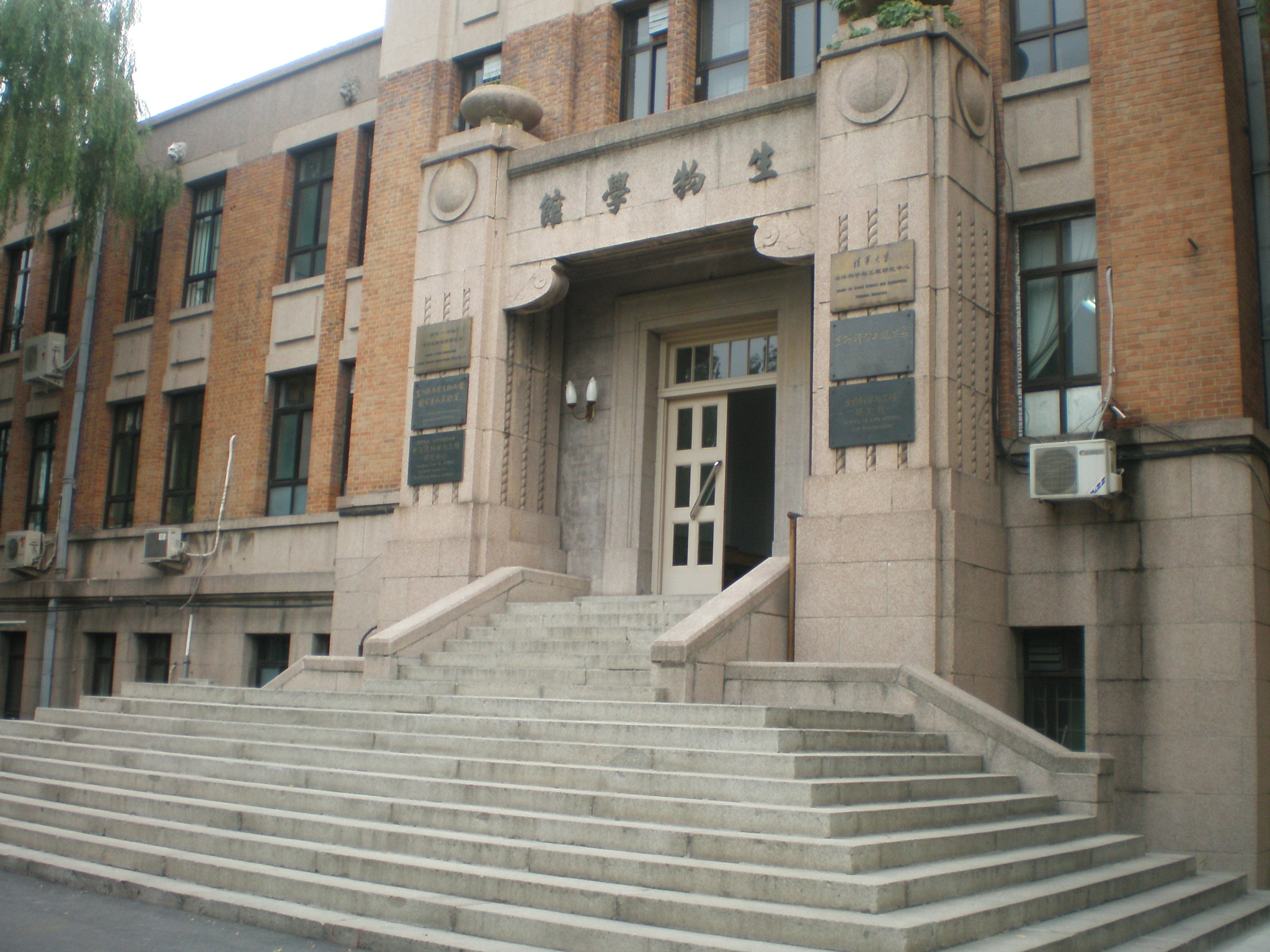 中文（中国大陆）: 清华大学生物学馆